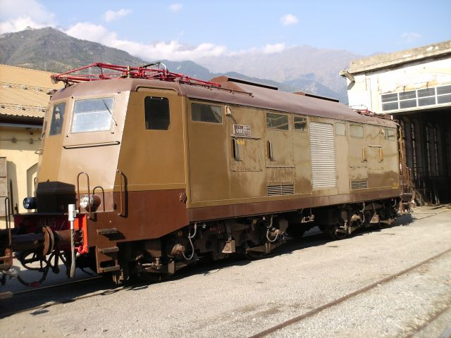 Locomotiva E.424.075 del FerAlp Team di Bussoleno.